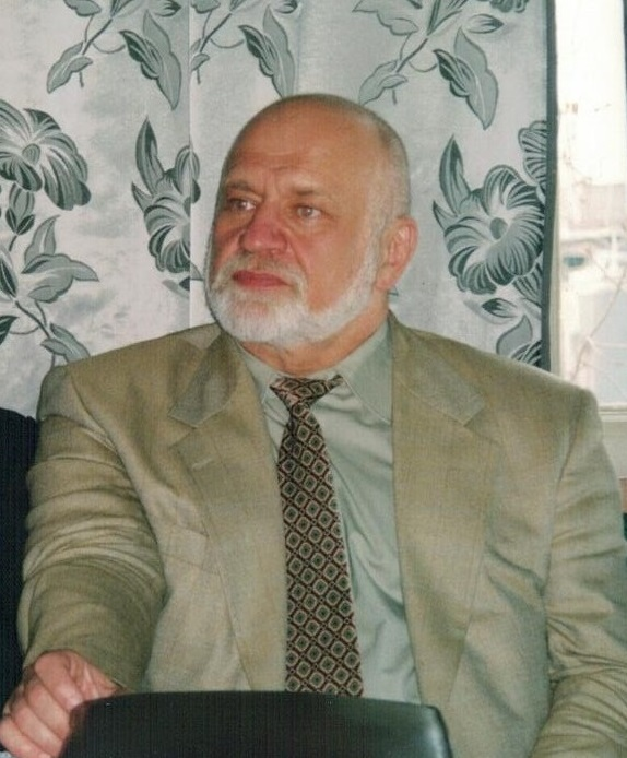 Мурад Аджи. Баку. 1 300-летие дастана "Китабе Деде-Коркуд". 2000 г.